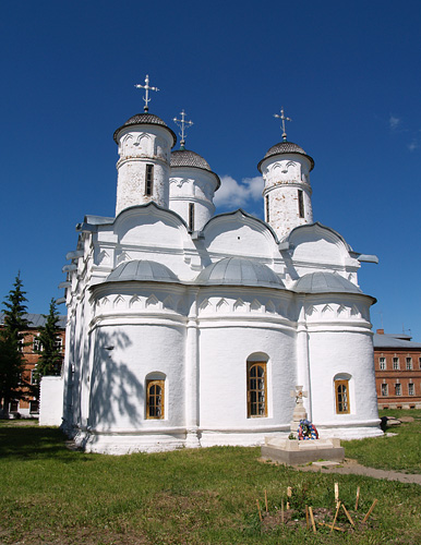 Ризоположенский соборСобор Положения риз Пресвятой Богородицы в Ризоположенском монастыре в Суздале